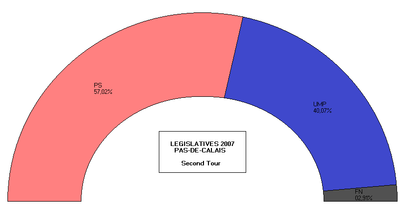 Résultats départementaux des législatives 2007, Pas-de-Calais, Second Tour.